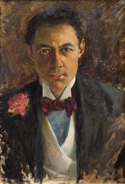 Self-portrait